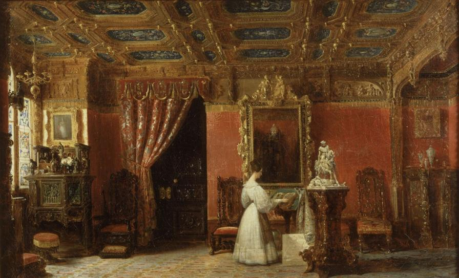 La princesse Marie d'Orléans (1813-1839) dans son atelier aux Tuileries. H. : 0,55 m. ; L. : 0,87 m. La princesse Marie d’Orléans (1813-1839), deuxième fille du roi Louis-Philippe et de la reine Marie-Amélie, fut l’une des artistes romantiques les plus attachantes. Formée enfant, comme ses frères et sœurs, au dessin, puis à la peinture, par Ary Scheffer, qui était un proche de sa famille, elle s’orienta vers la sculpture et devint une artiste de talent. Très marquée par ses lectures d’ouvrages d’histoire et de romans, elle fit réaménager le salon de son appartement des Tuileries par l’architecte Charpentier, en 1835, dans le goût gothique, pour donner un écrin à ses œuvres. Des meubles anciens achetés à des marchands spécialisés, et d’autres neufs, commandés à des menuisiers, vinrent compléter cet ensemble. Le tableau détaille bien l’ambiance riche et chaleureuse de la pièce, le décor architectural en bois et carton-pierre, du menuisier Petit et du sculpteur décorateur Cruchet, le décor textile des murs, les vitraux, la moquette à impression et le mobilier. Au centre de la pièce, Marie, debout, vêtue d’une robe blanche, nouée à la taille par une écharpe de cachemire, feuillette un ouvrage enluminé posé sur un lutrin. Parmi les sculptures, on reconnaît le Charles VI dans la forêt du Mans de Barye, sur le dressoir, près de la fenêtre, et la Jeanne d’Arc pleurant à la vue d’un anglais blessé, de Marie, sur le grand piédestal à côté d’elle. Lafaye a représenté à plusieurs reprises le salon de Marie d’Orléans, mais ce tableau semble être le premier. Resté dans la famille d’Orléans, il a pu être acquis lors de la vente du duc de Vendôme, en 1931. Technique : Huile sur toile Dimensions : 55x87 cm Référence : MV 6120